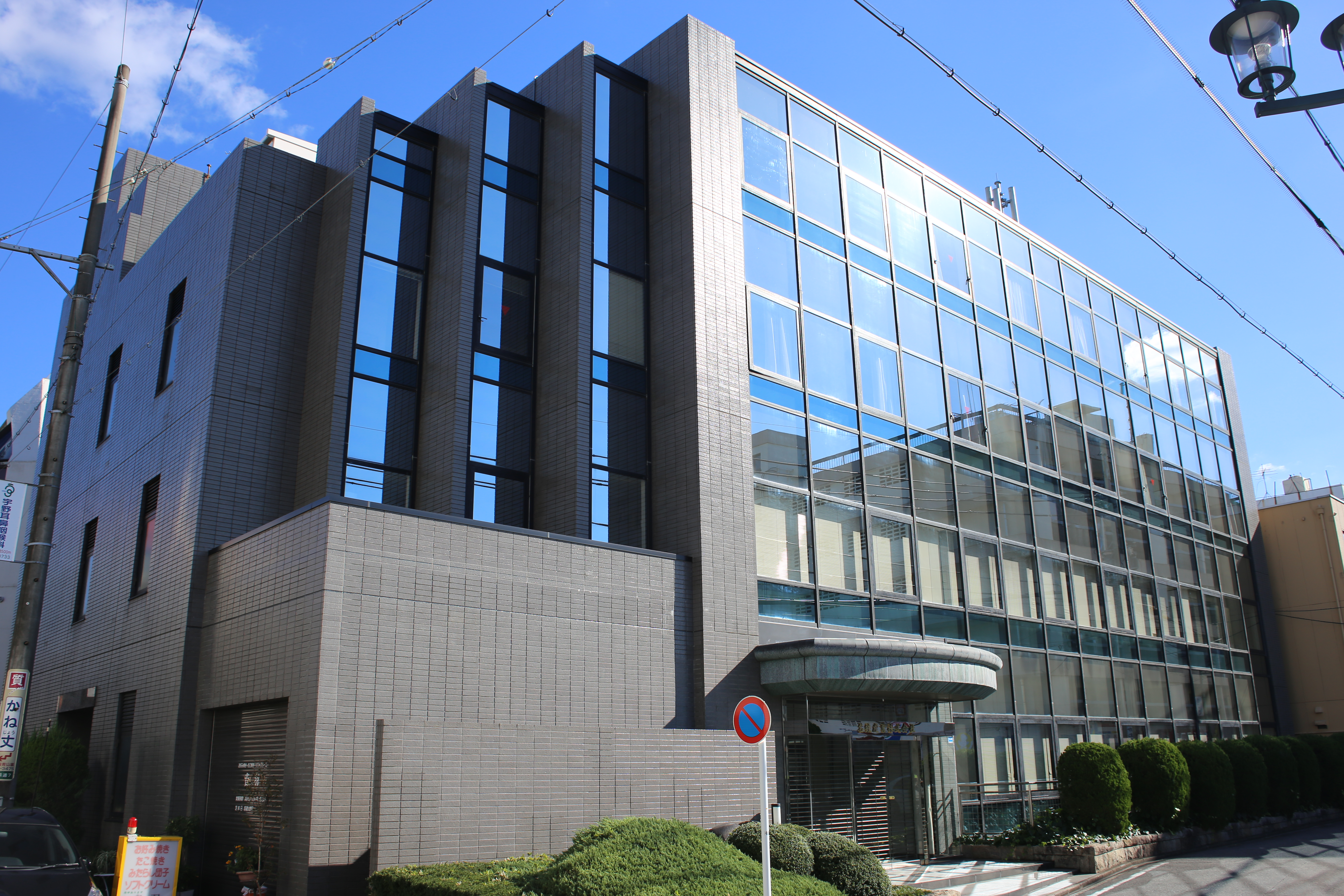 名古屋市南区前浜通の名鉄産業本社を西側公道北側より撮影